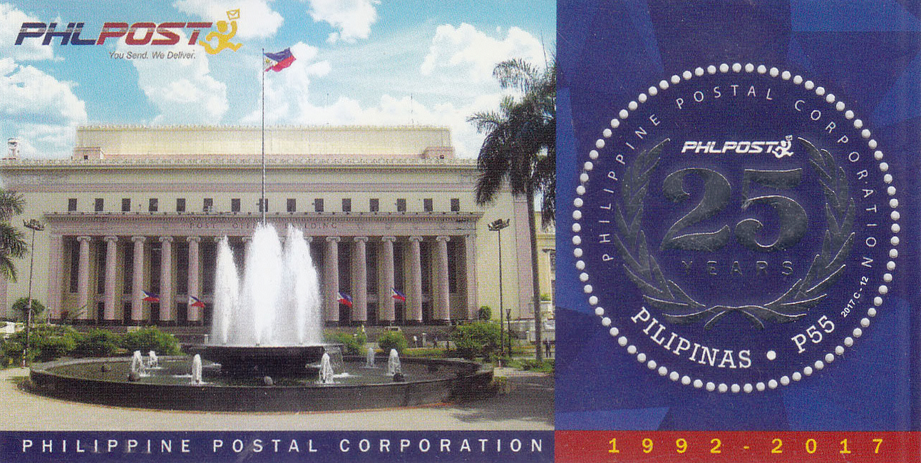 25th CORPORATE ANNIVERSARY OF THE PHILIPPINE POSTAL CORPORATION